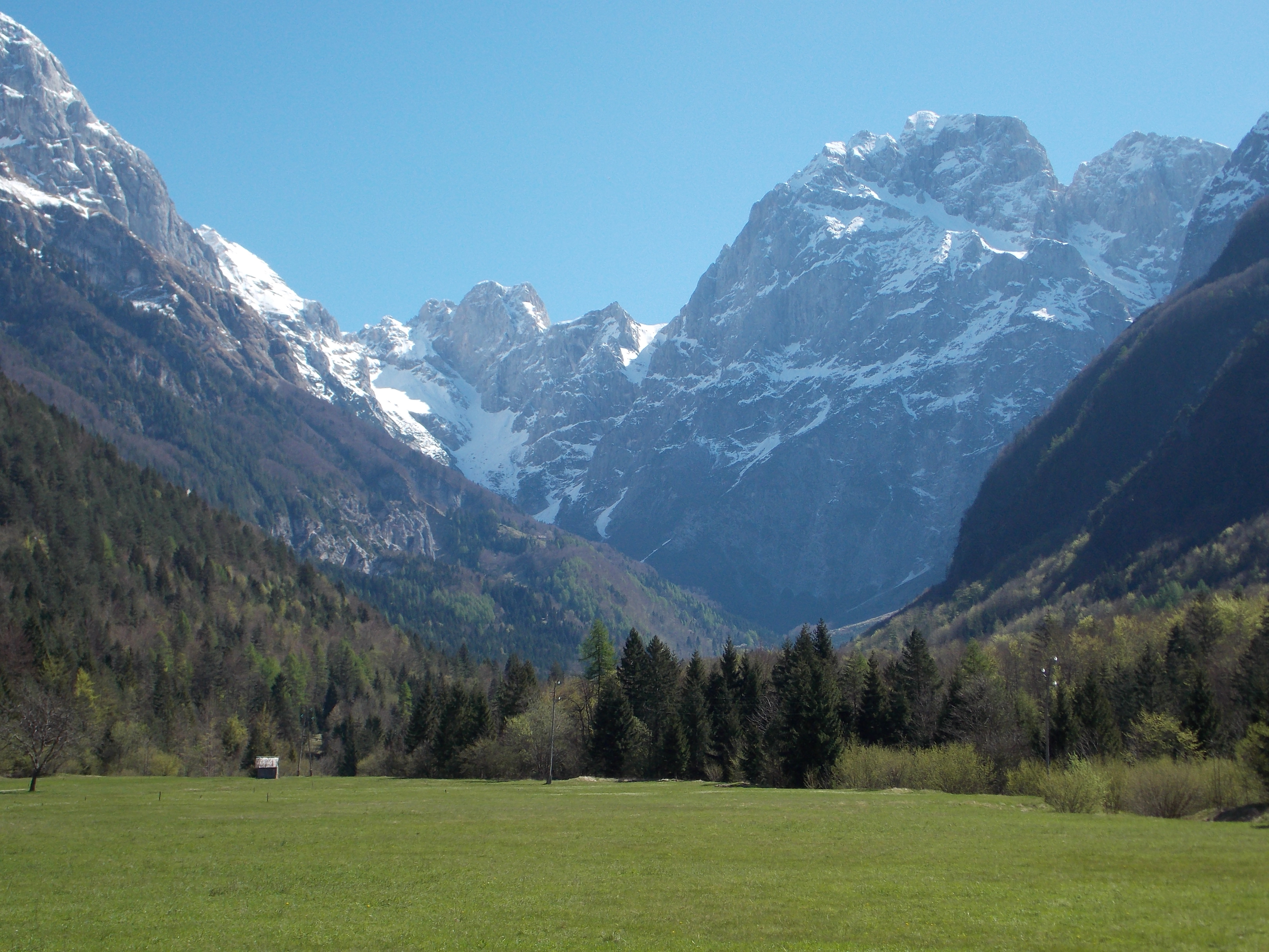 Loška Koritnica